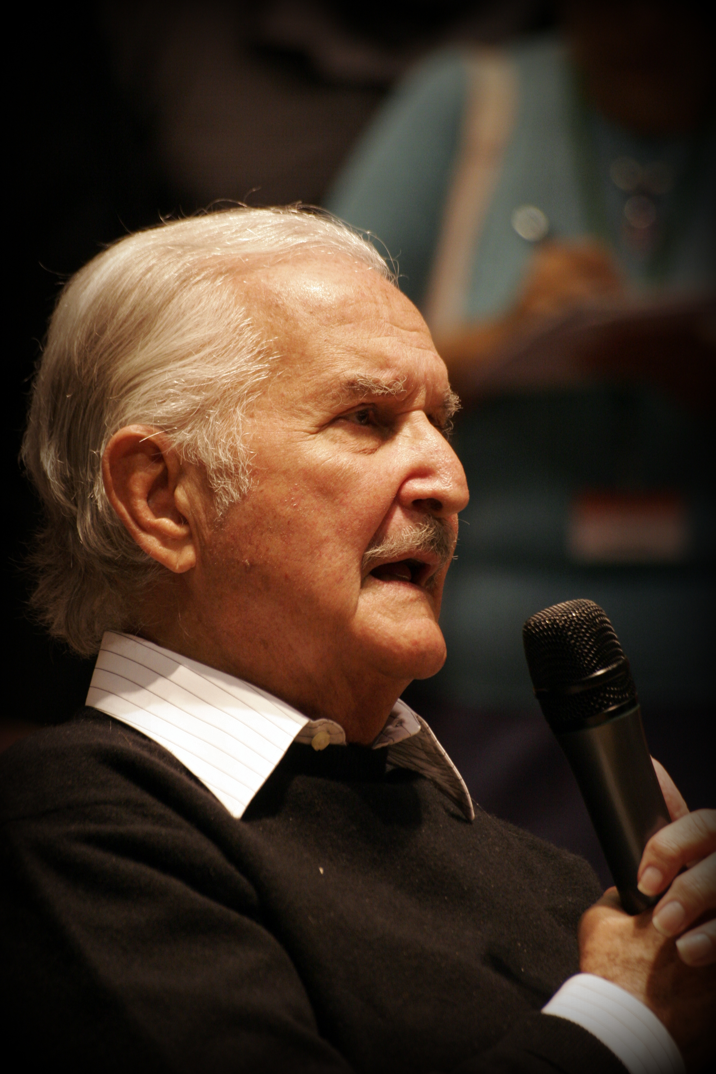 Carlos Fuentes, en mars 2009 à Paris.